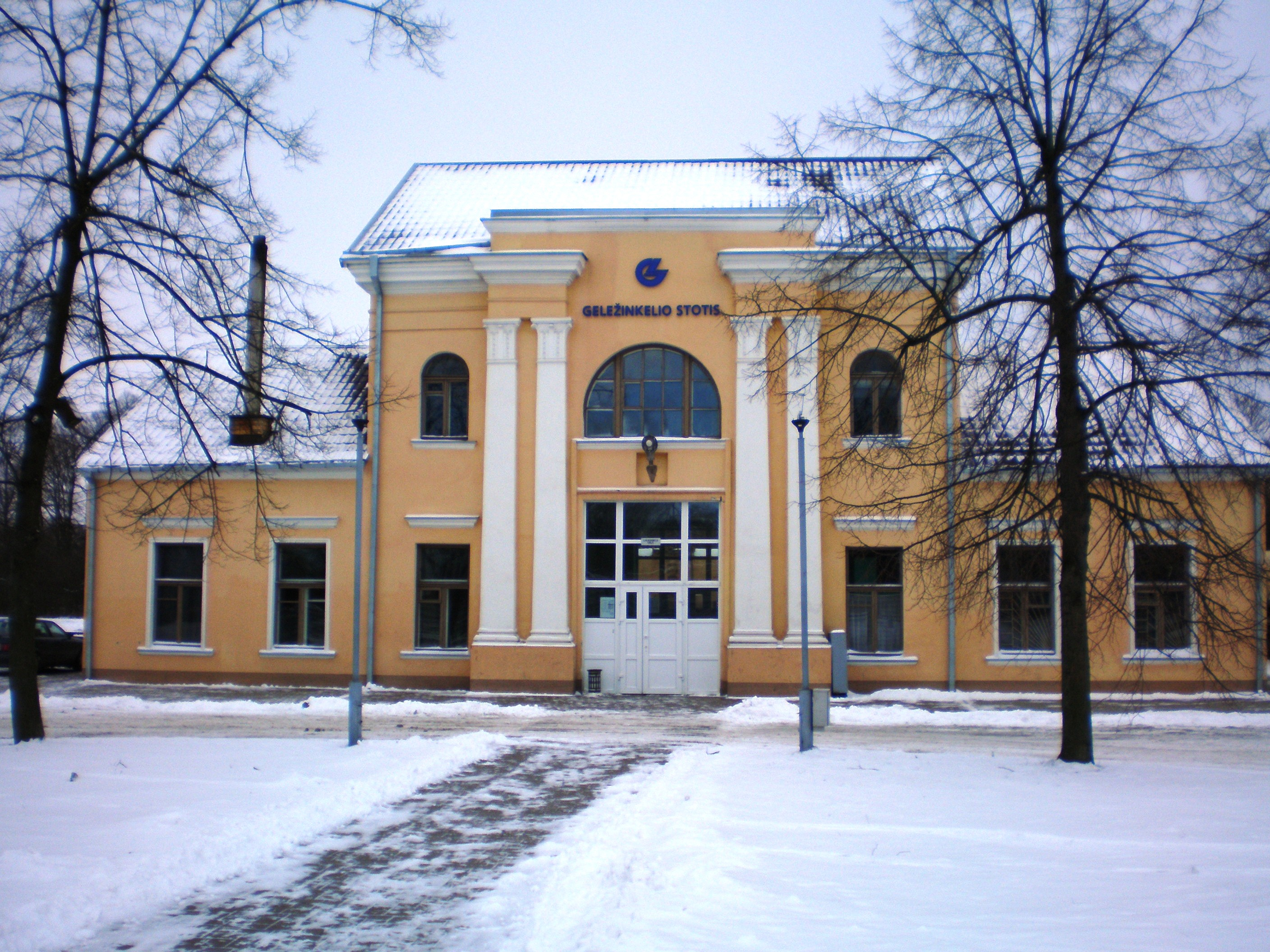 Kėdainių geležinkelio stotis